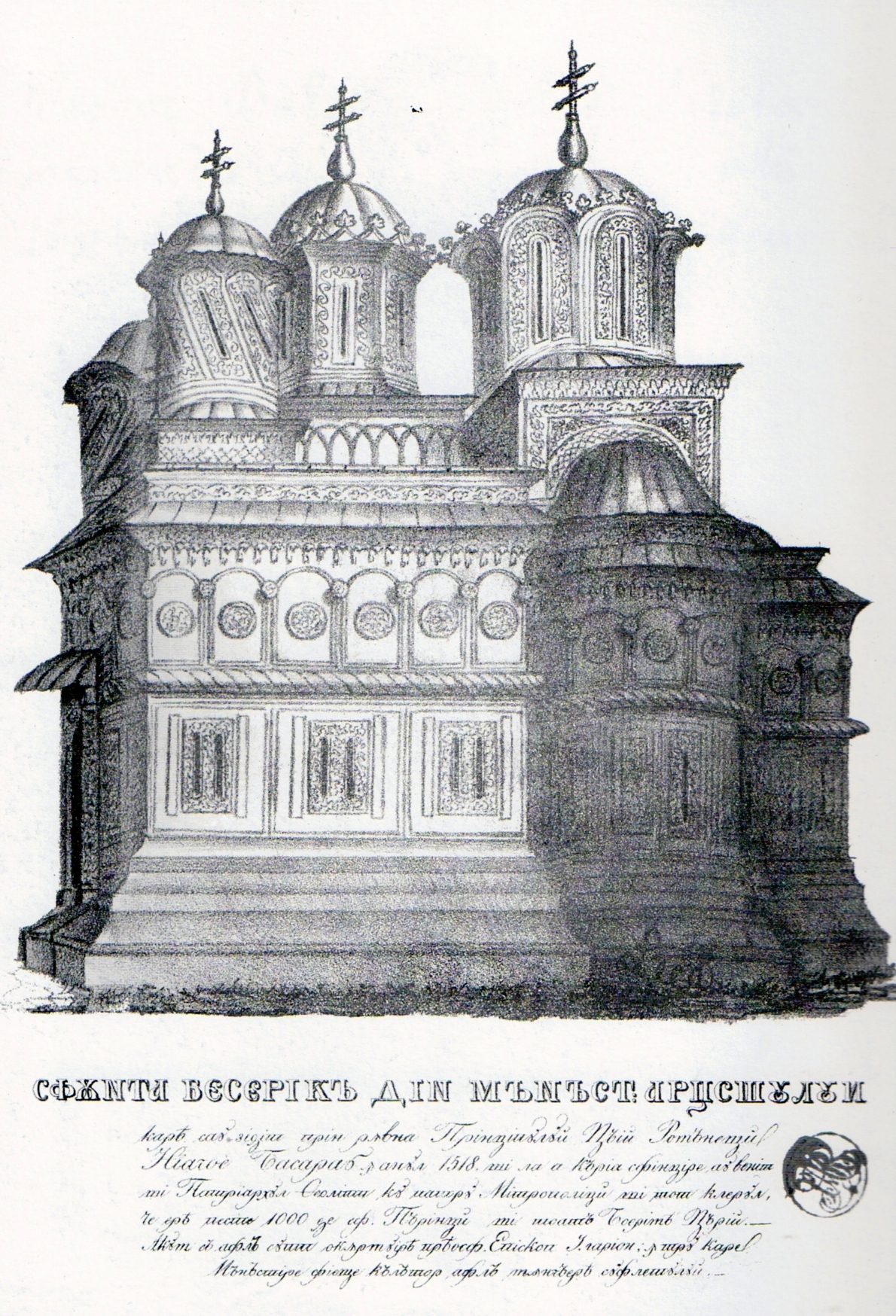 Biserica Manastirii Arges, desen, Biblioteca Academiei Române